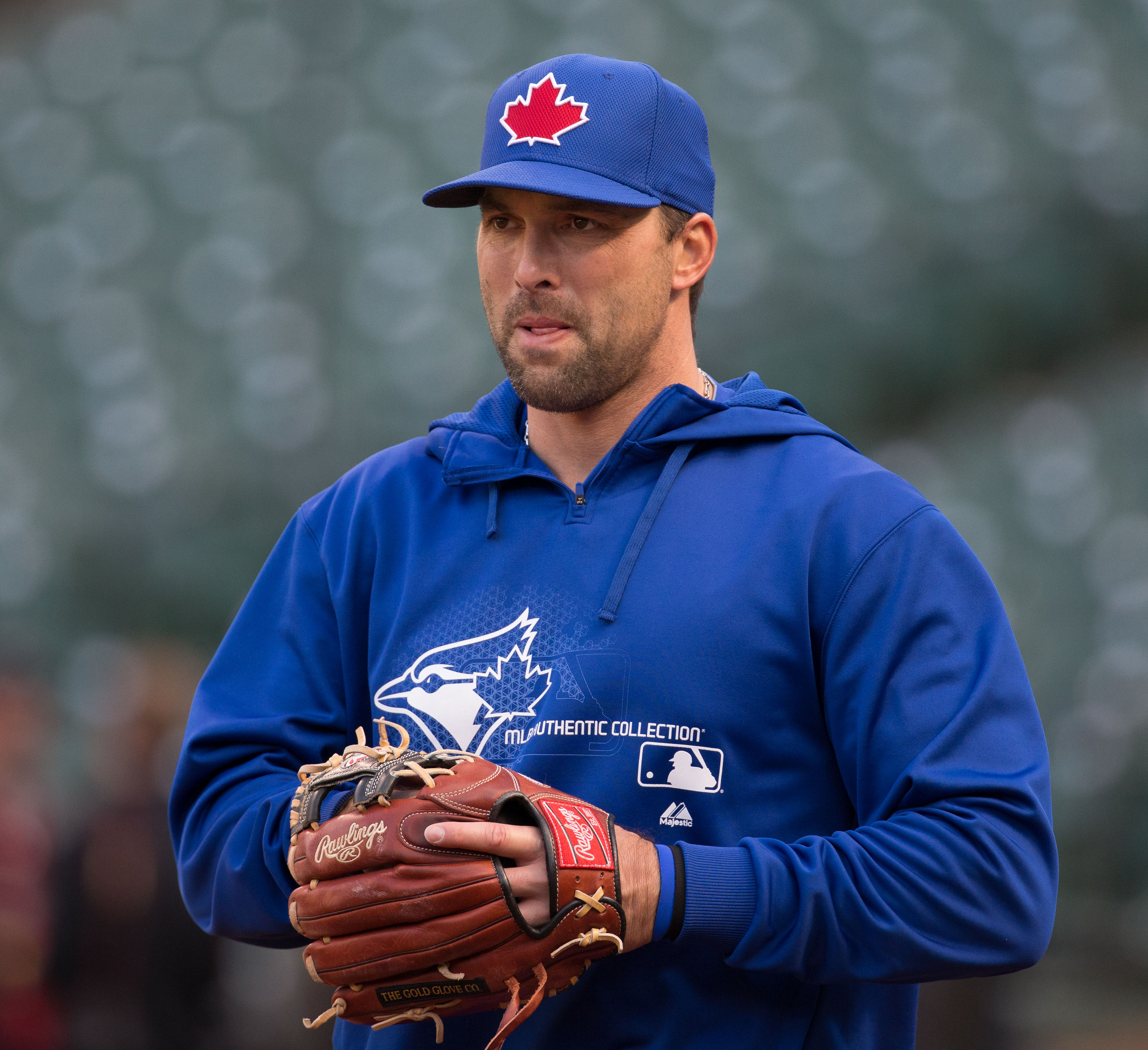 Mark DeRosa